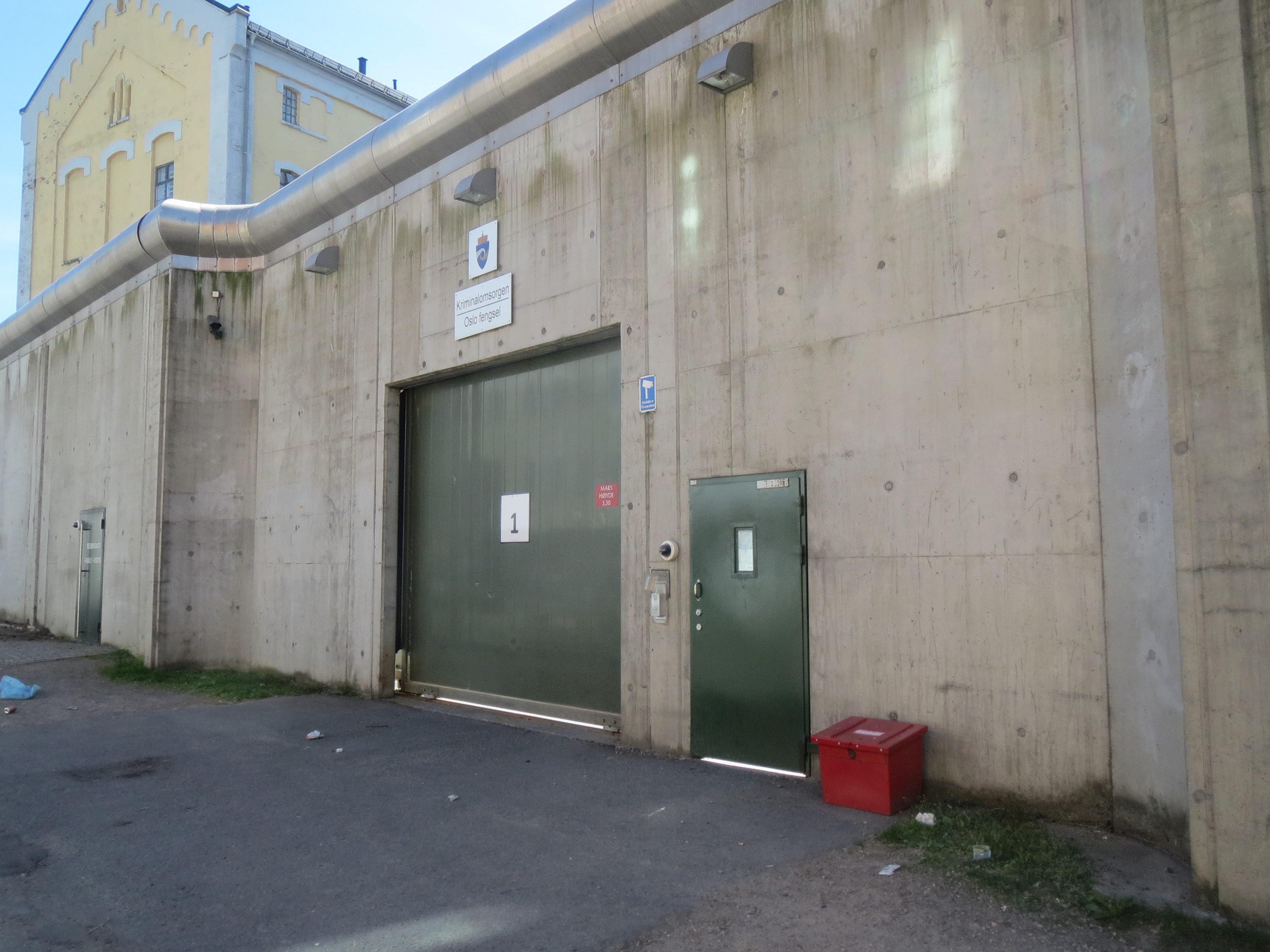 Oslo fengsel avd. B har inngang fra Åkebergveien 11